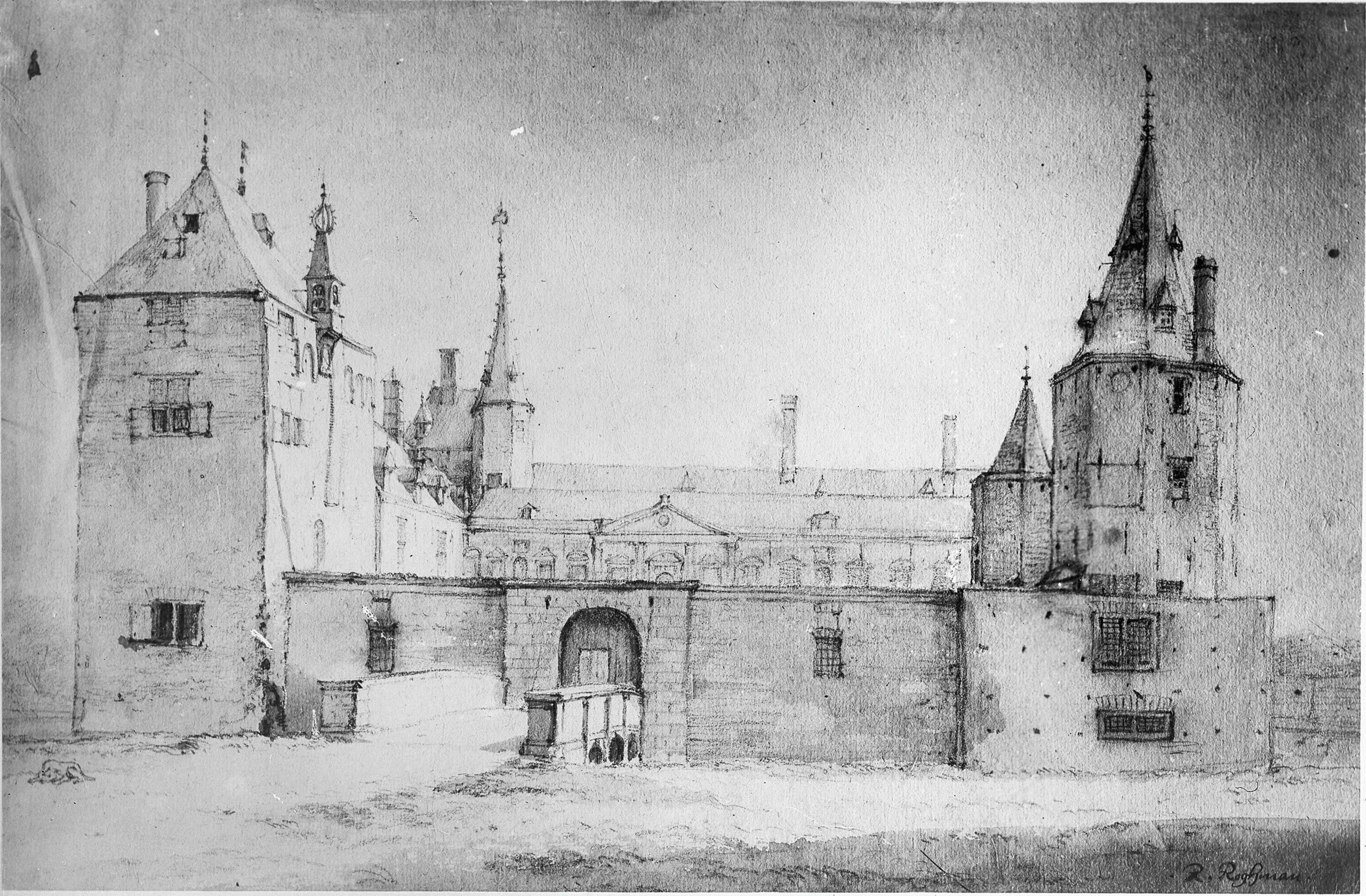 Kasteel Warmond: kasteel naar oude tekening